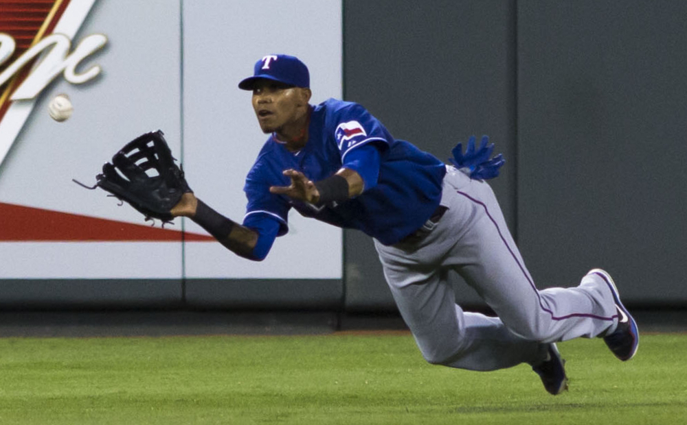 Engel Beltré